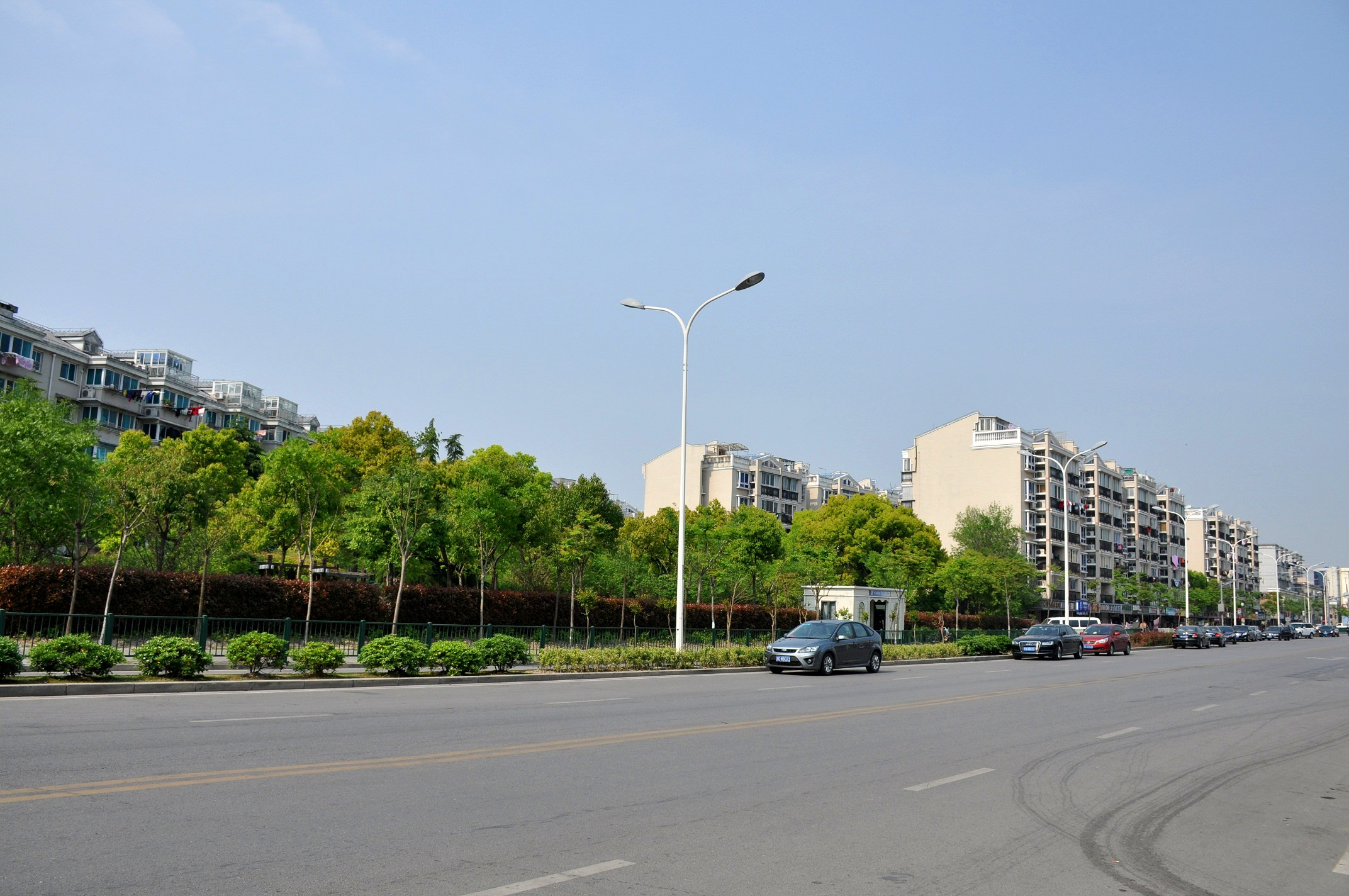 三林路 望向东明路街道辖境一侧